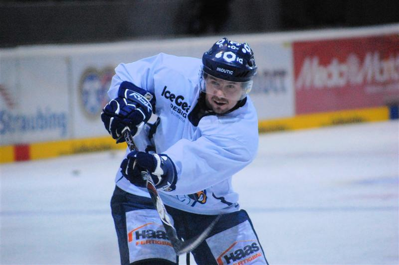 Dusan Frosch